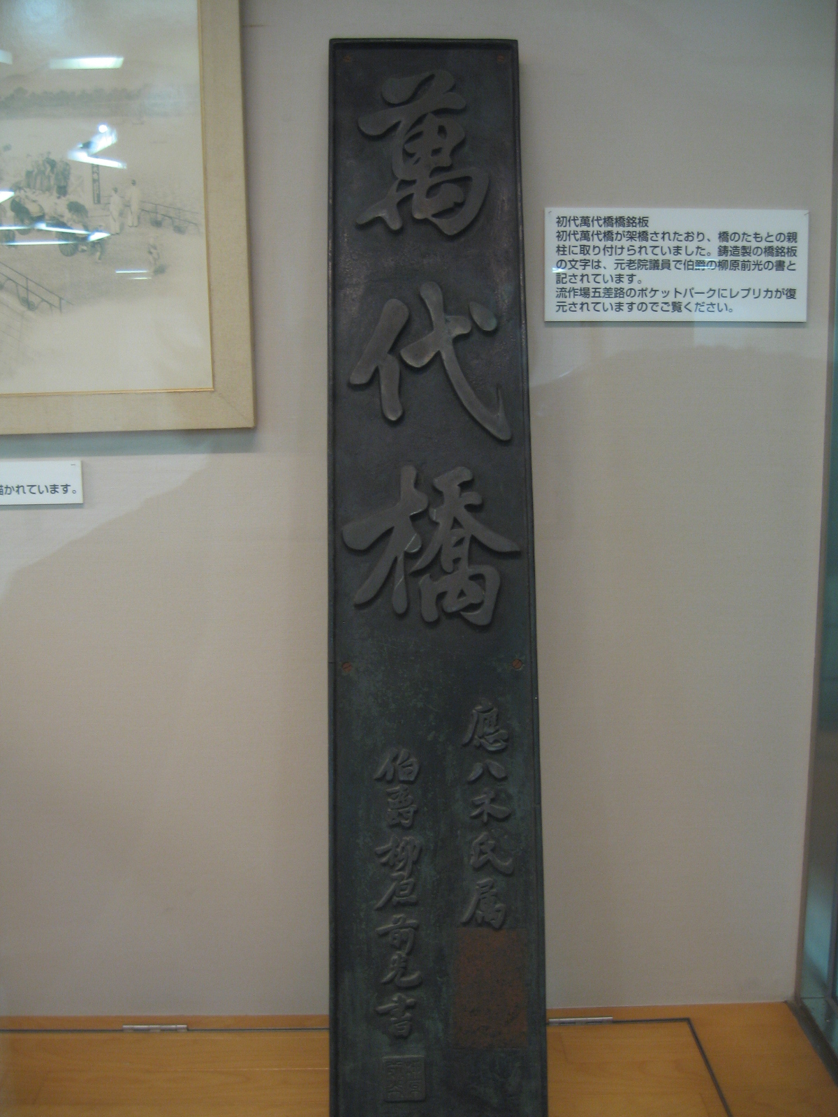 新潟市中央区。万代クロッシング内に展示されている初代萬代橋の橋名板。